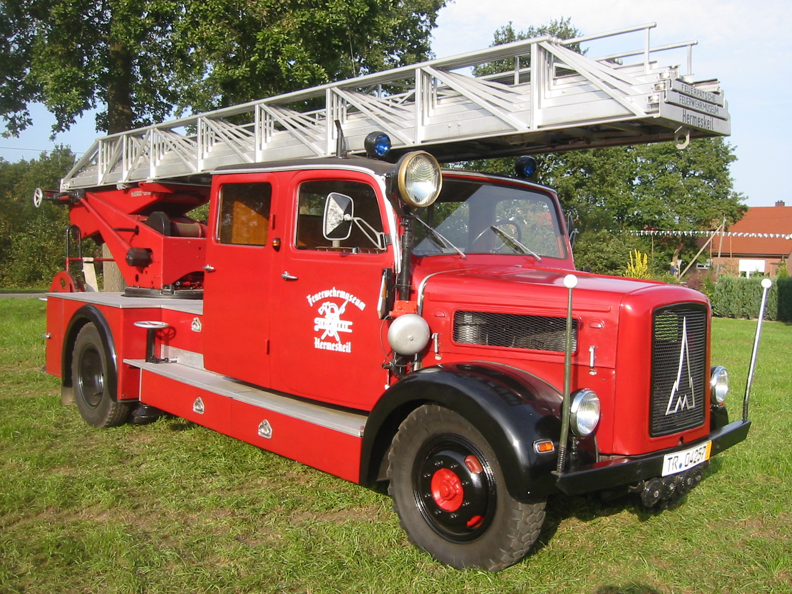 Aufbau und Fahrgestell der Drehleiter DL 23-2 sind beide von Magirus-Deutz. Tag der Erstzulassung ist der 10.4.1952 gewesen. Das Fahrzeug war ursprünglich bei der Berufsfeuerwehr Kaiserslautern im Einsatz gewesen. Der Anschaffungspreis betrug 48.830,00 DM. Am 25.06.1979 wurde sie an die Feuerwehr Kirchheimbolanden verkauft, wo sie bis Ende der 80er Jahre noch in Dienst stand. Anschließend wurde sie an die Feuerwehr Kaiserslautern zurückgegeben. Von dort erhielt das Feuerwehrmuseum diese Drehleiter und restaurierte sie.